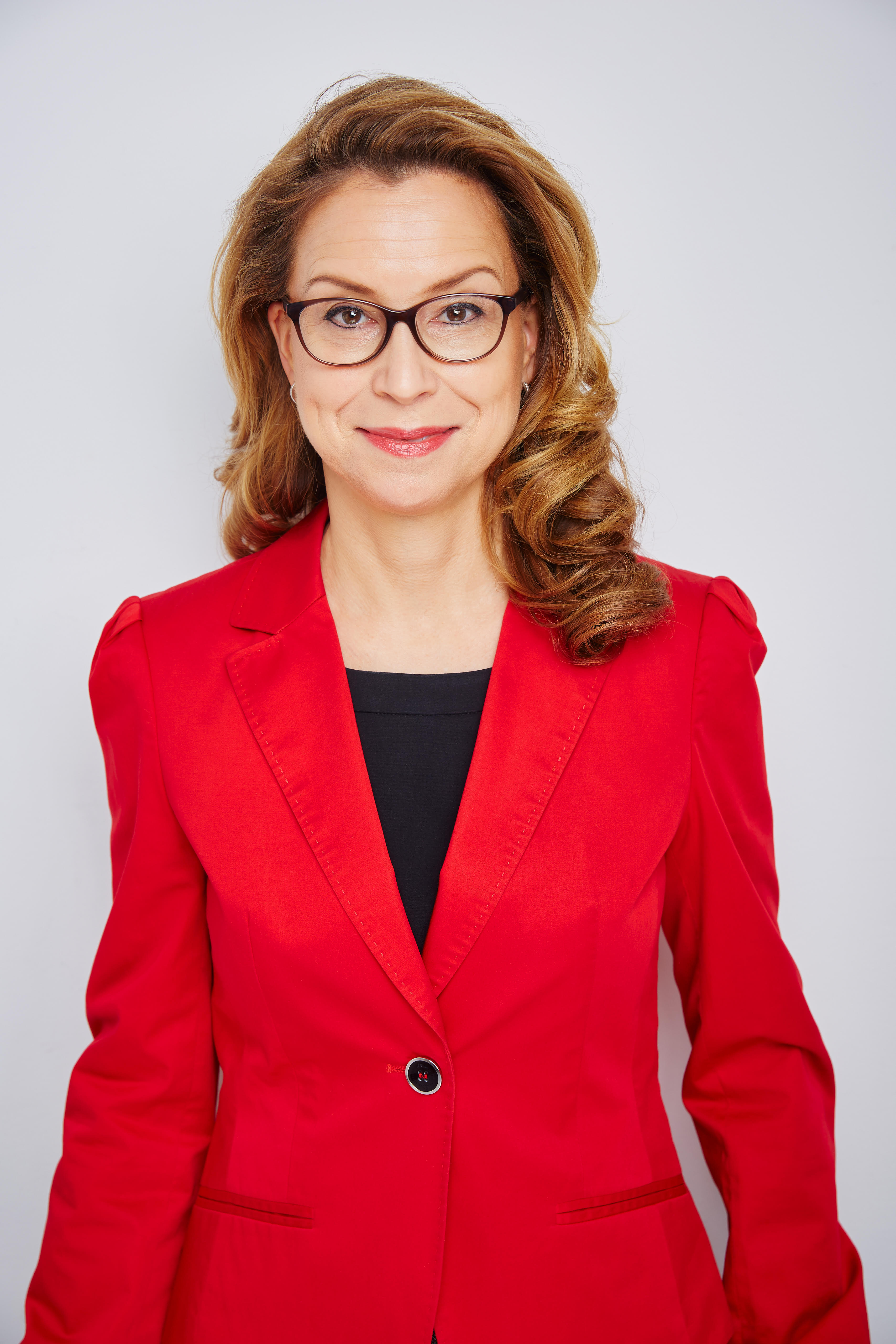 Carola Veit, Foto: Frank Wartenberg